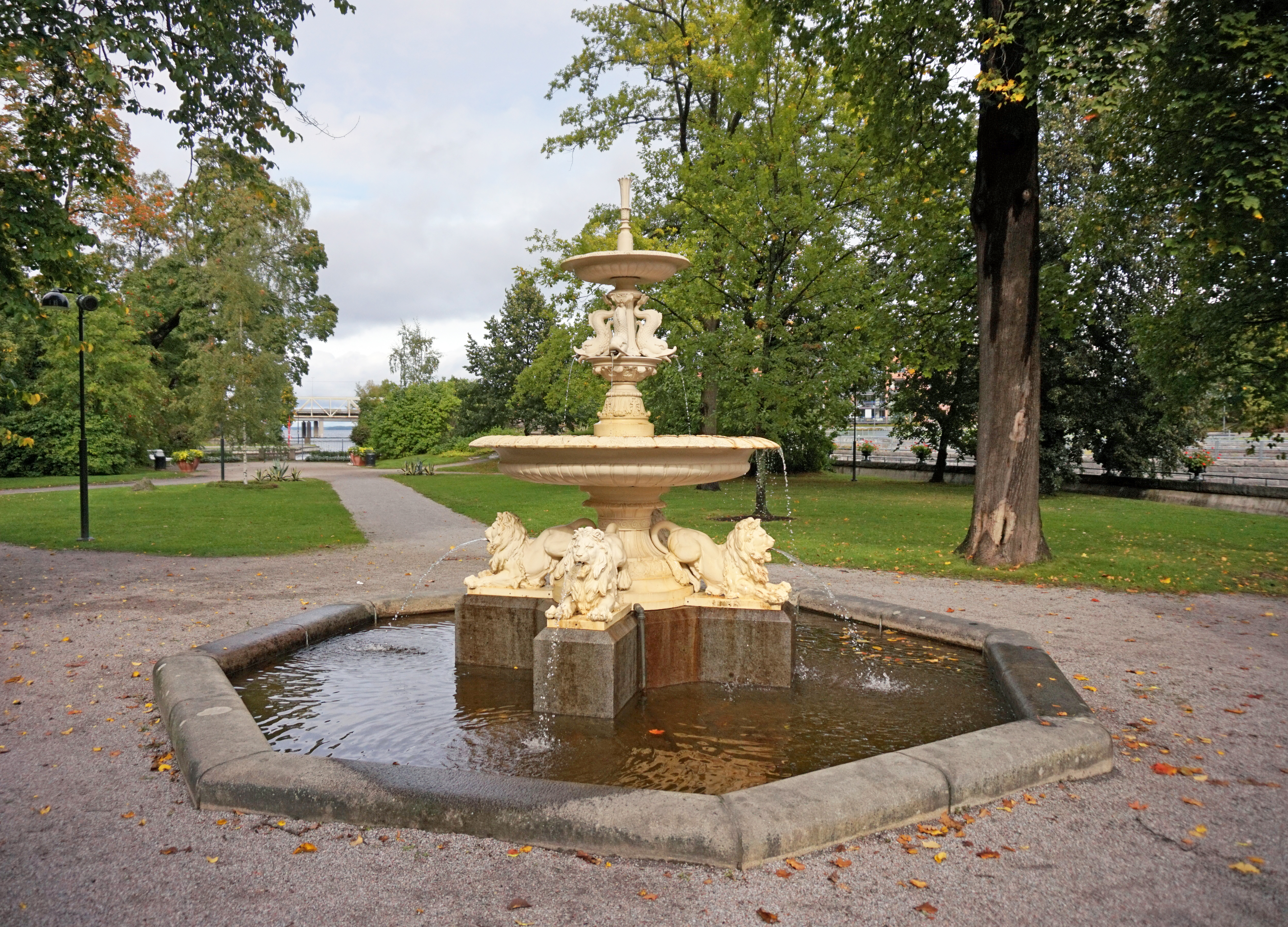 Tammerkosken teollisuusmaisemaa: suihkulähde Wilhelm von Nottbeckin puistossa. This is a photo of a monument in Finland identified by the URL 5021